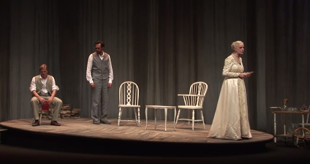 Escena de la representación de la obra de teatro Largo viaje hacia la noche en Madrid (2014)